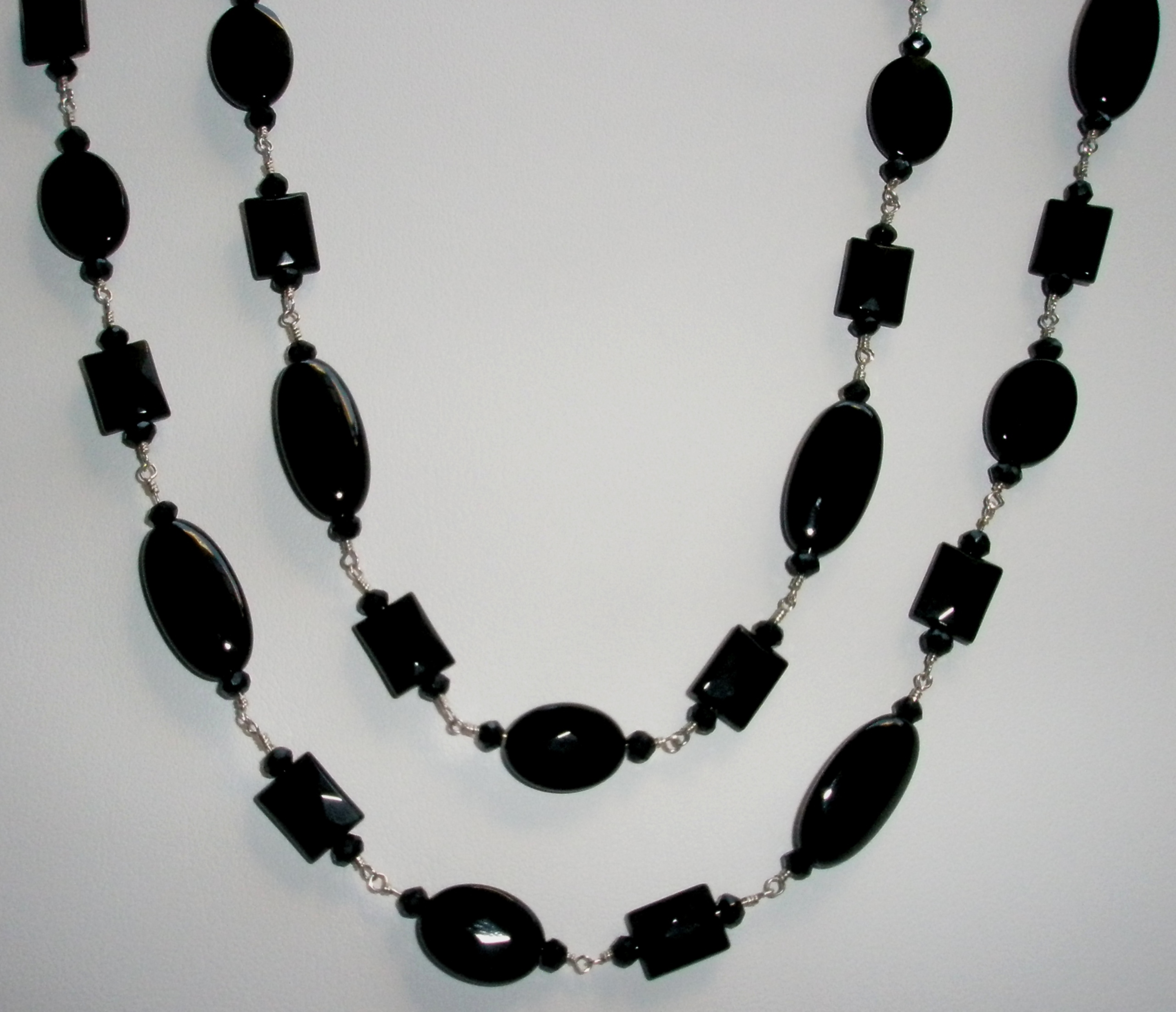 Zdjęcie przedstawiające biżuterię z onyksem English | polski | +/−